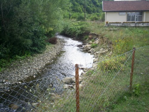 Река Неродимка протиче кроз Горње Неродимље.